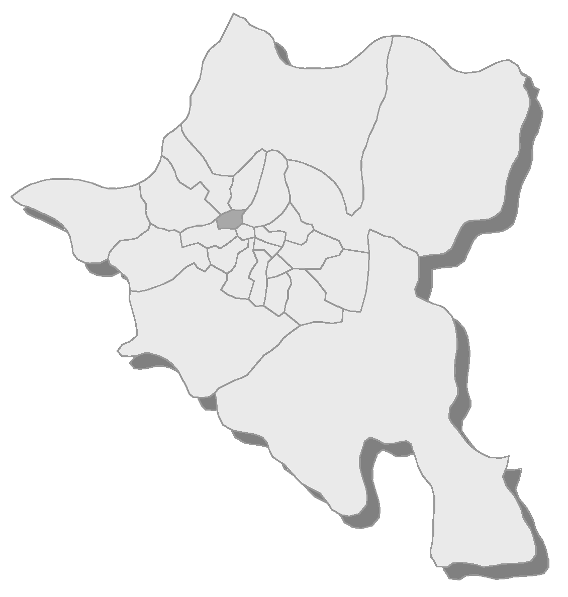 Sofia, municipality Ilinden